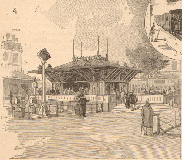 Chemin de Fer-Tramway Decauville de l'Exposition Universelle Paris 1889